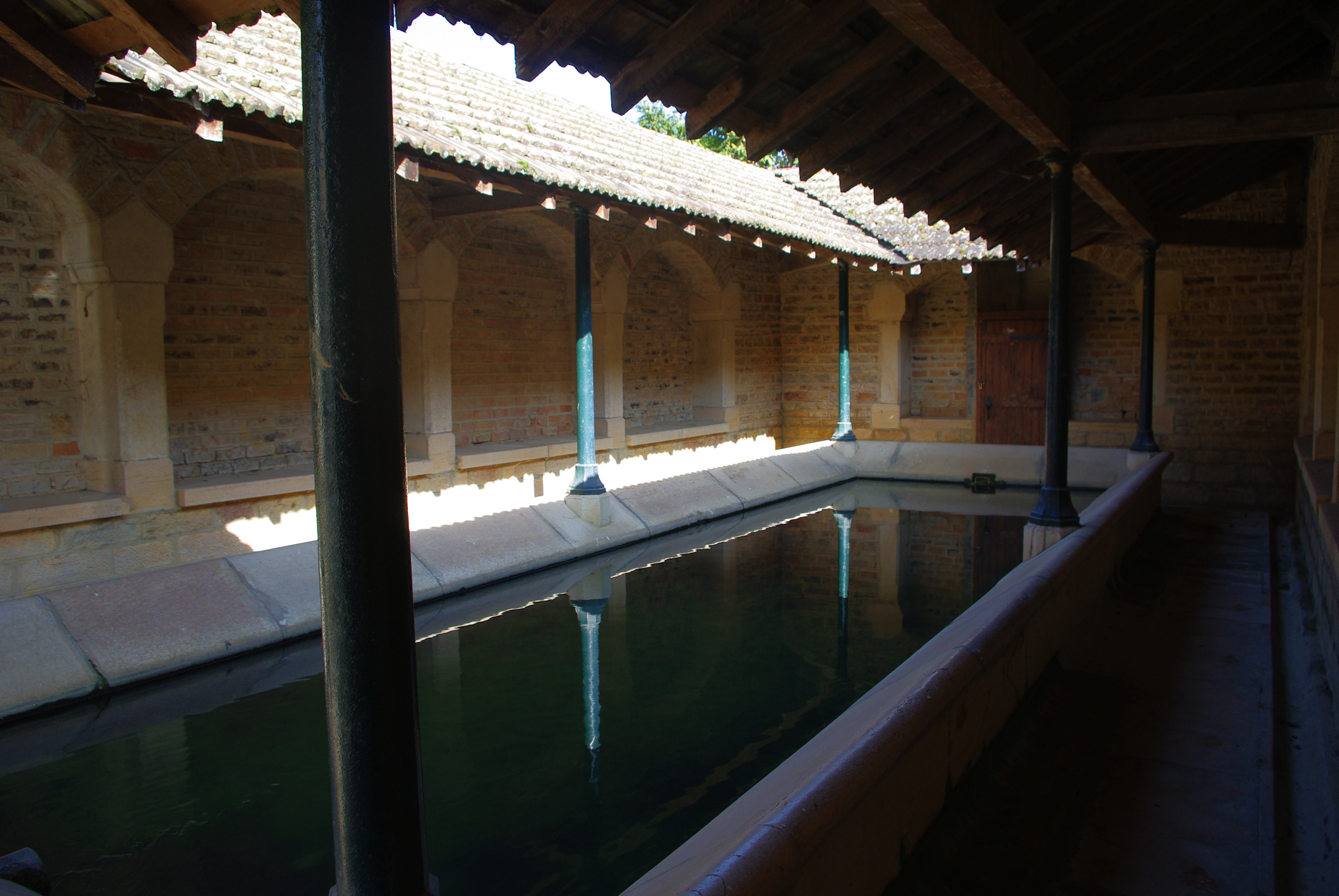 Lavoir à Impluvium d'Igé (Saône-et-Loire, France)